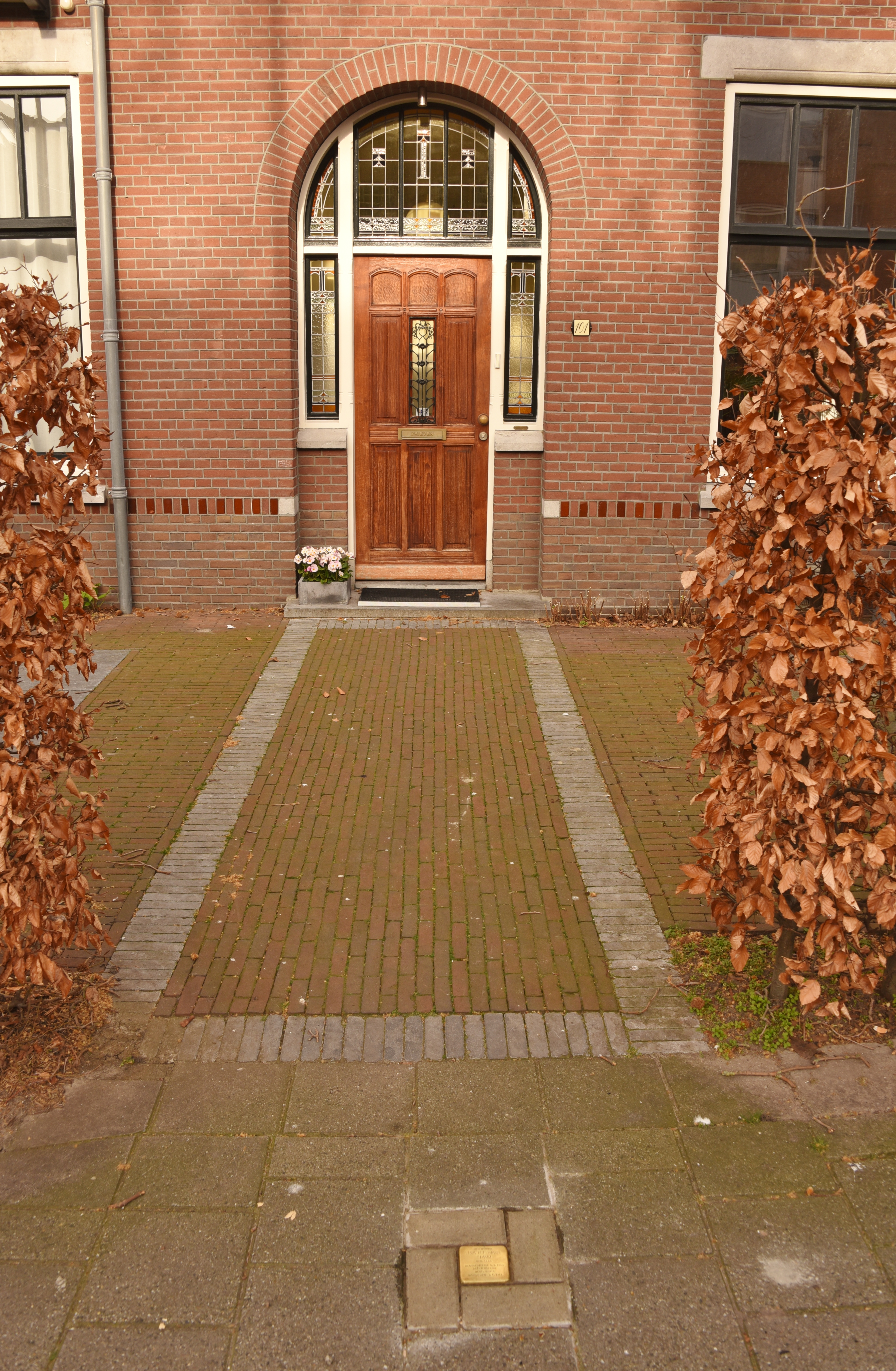 Stolperstein für Lina Feldmann-Stamm